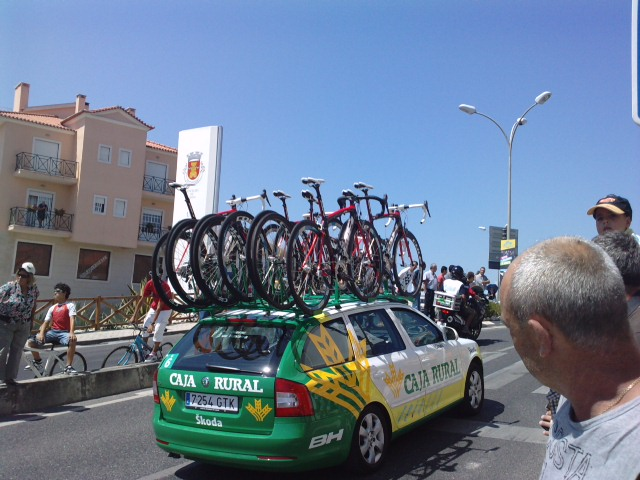 Carro de apoio da equipa de ciclismo Caja Rural na Volta a Portugal em Bicicleta 2010